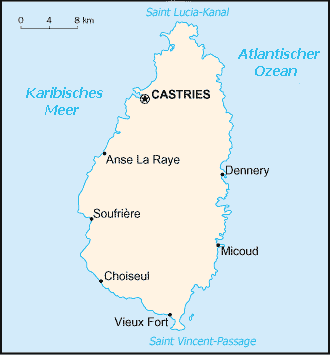 Karte von St. Lucia